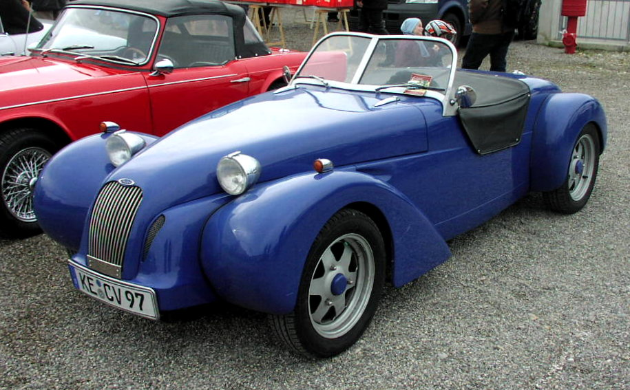 Burton